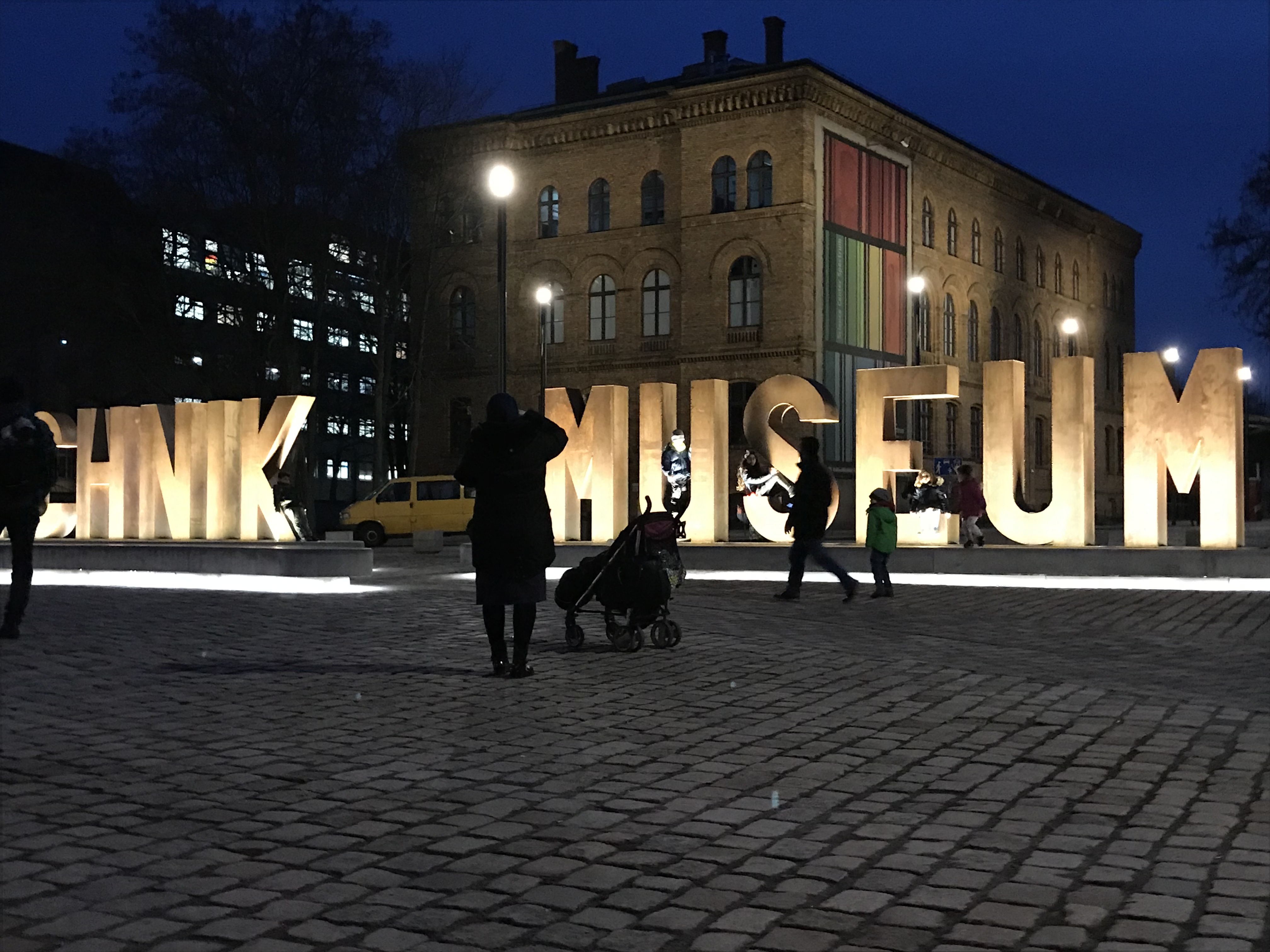 Vorplatz Deutsches Technikmuseum mit Science Center Sprektrum